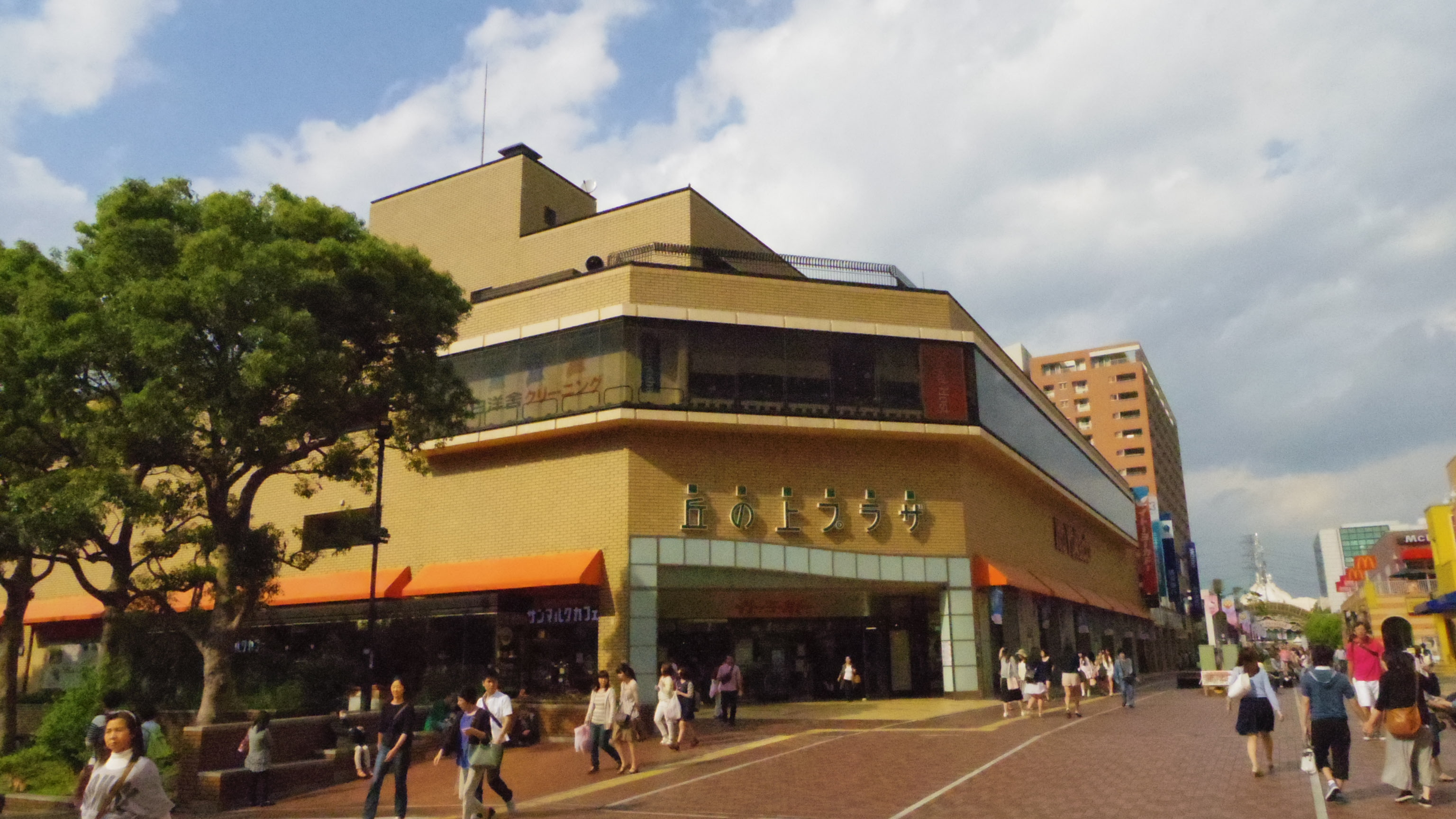 東京都多摩市落合にある商業施設「丘の上プラザ」。イトーヨーカドーを核に、専門店などで構成される。